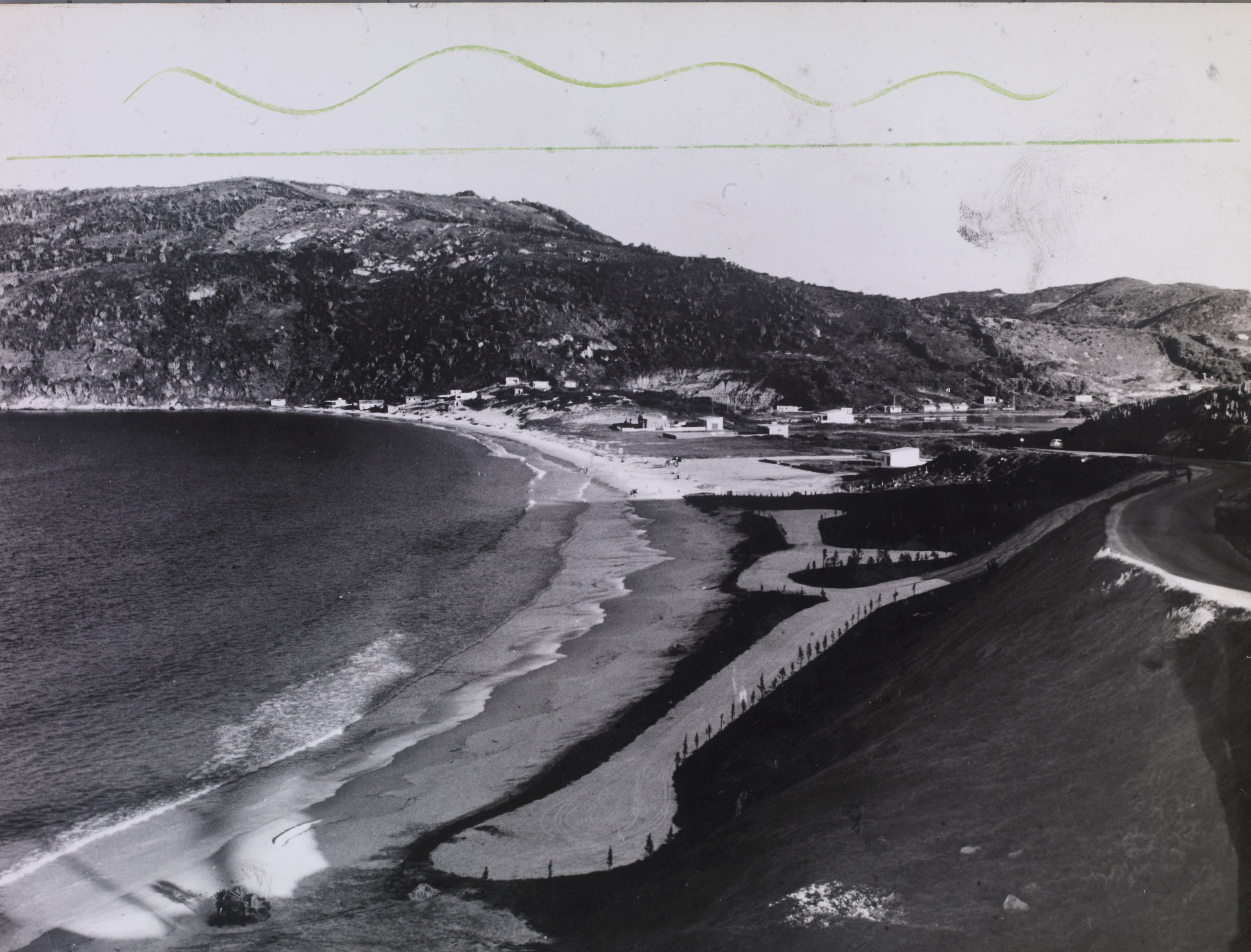 Fotografia do Fundo Correio da Manhã, sob a guarda do Arquivo Nacional.